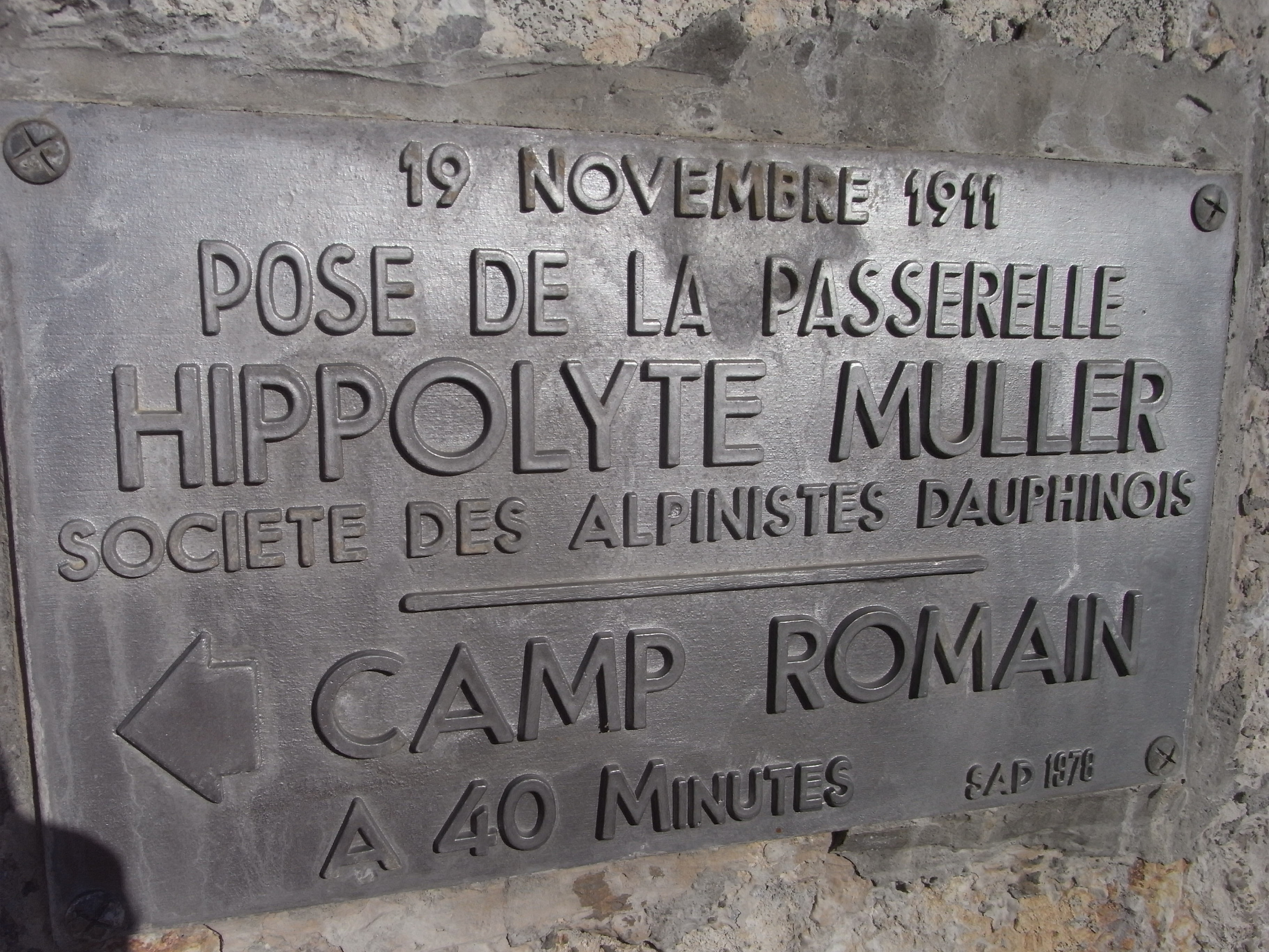 Plaque commémorative de Hippolyte Müller au niveau de la passerelle, au Néron.